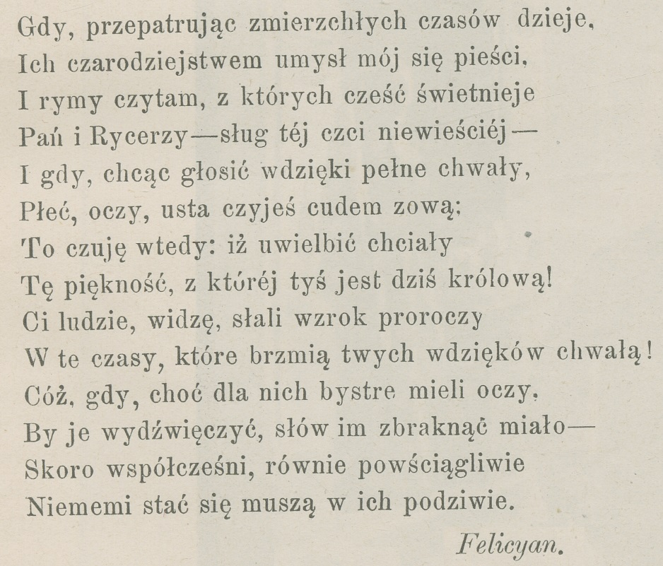 Pierwsze tłumaczenie na język polski sonetu 106 Williama Szekspira przez Felicjana Faleńskiego (Tygodnik Ilustrowany, 1891, 84, str. 103).